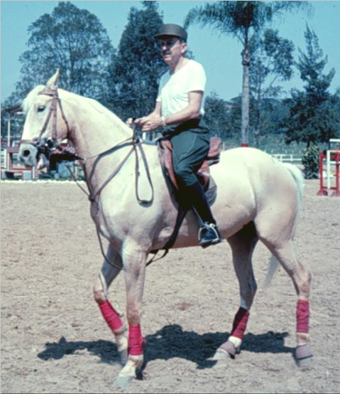 imagem de arquivo pessoal, Gal Jose Fragomeni